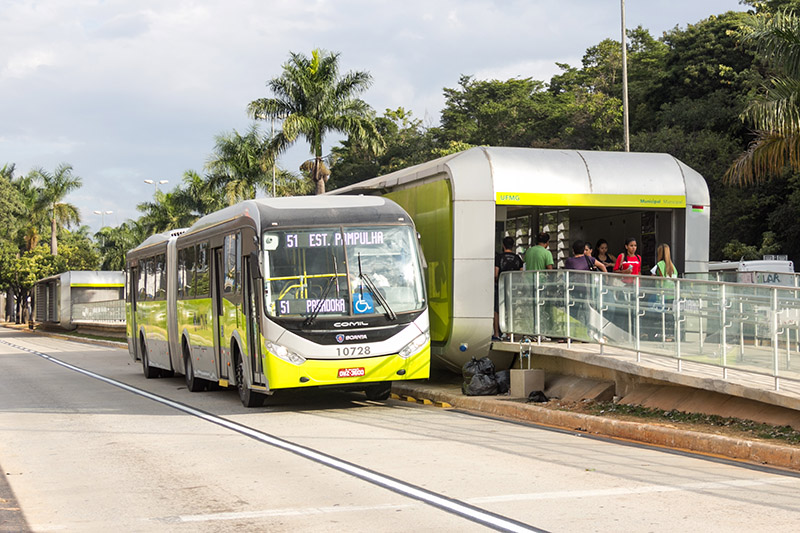 Ônibus do sistema BRT da cidade de Belo Horizonte transitando na Avenida Presidente Antônio Carlos.